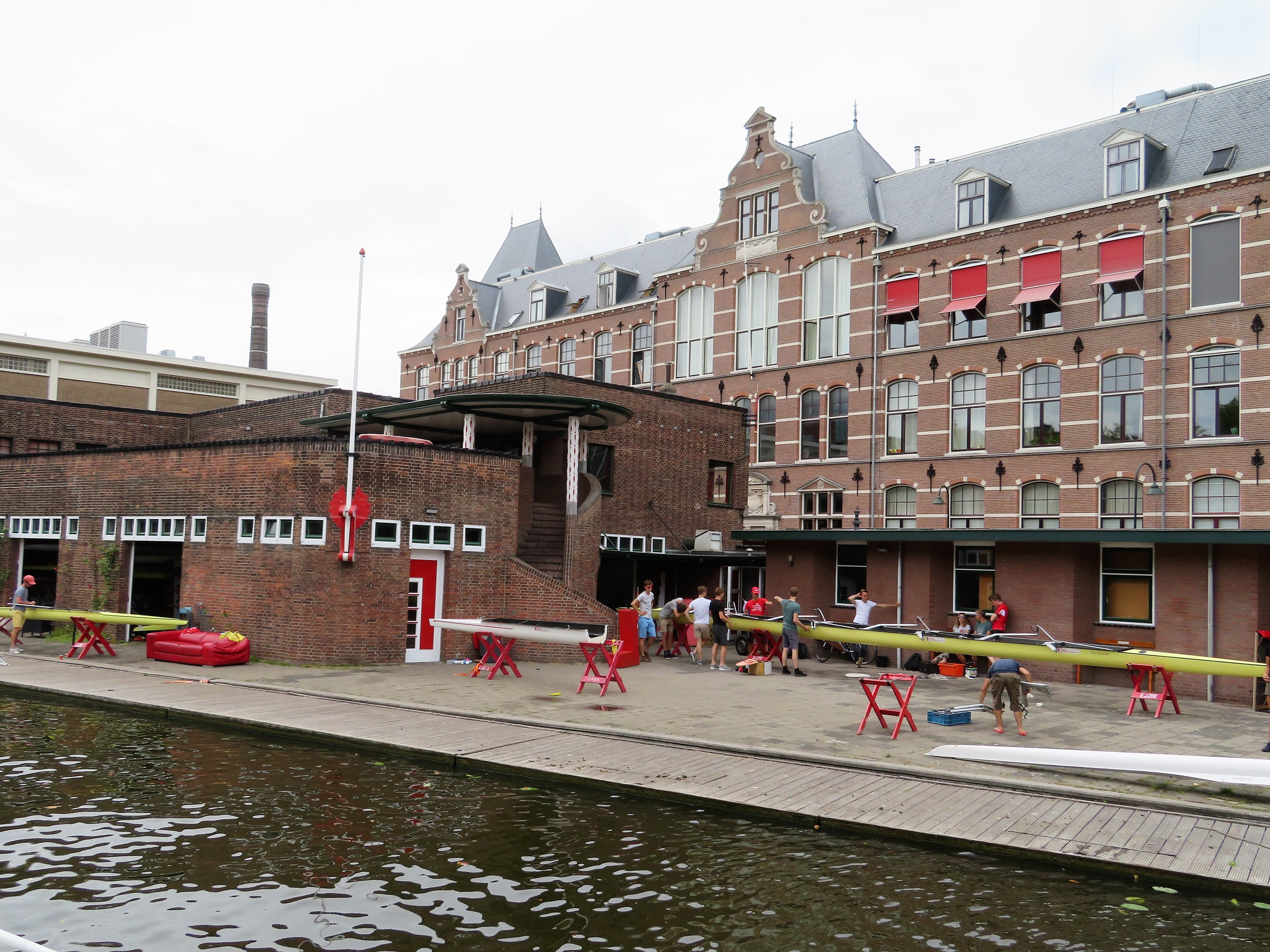 Delftse Studenten Roeivereniging LAGA